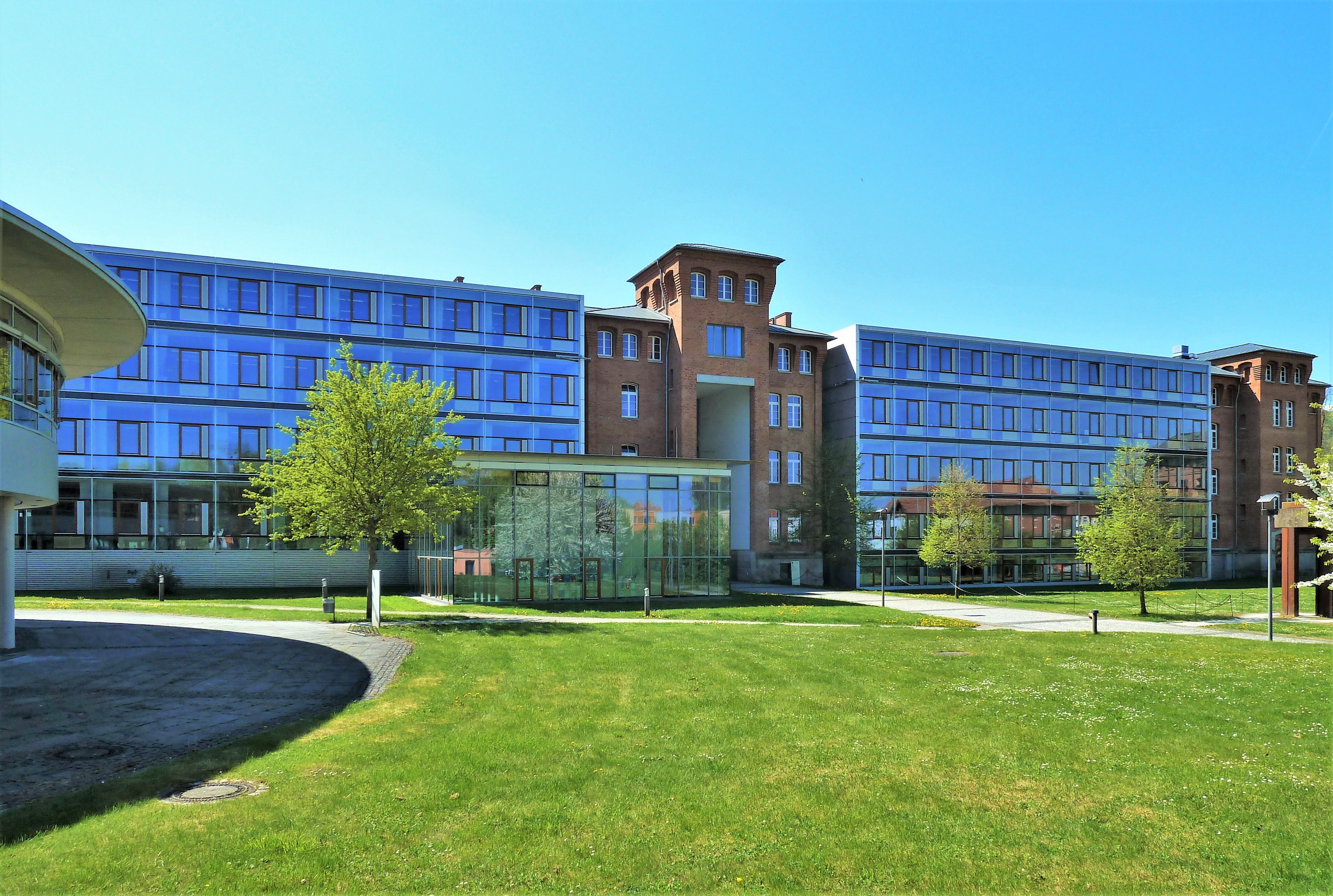 Justizzentrum Meiningen, Hauptgebäude (ehemalige Kaserne) und Bibliothek (Mitte im Vordergrund).